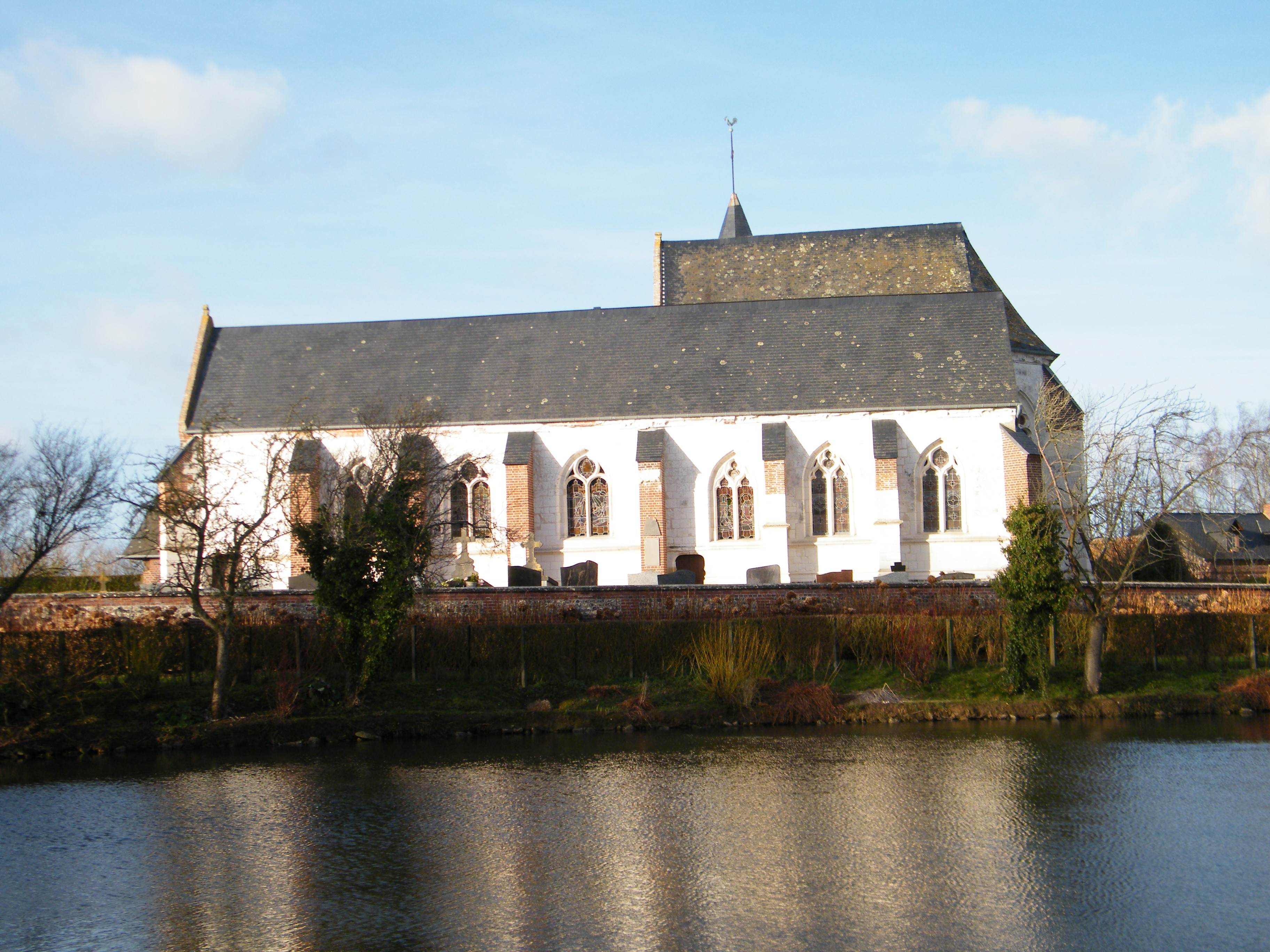 église.